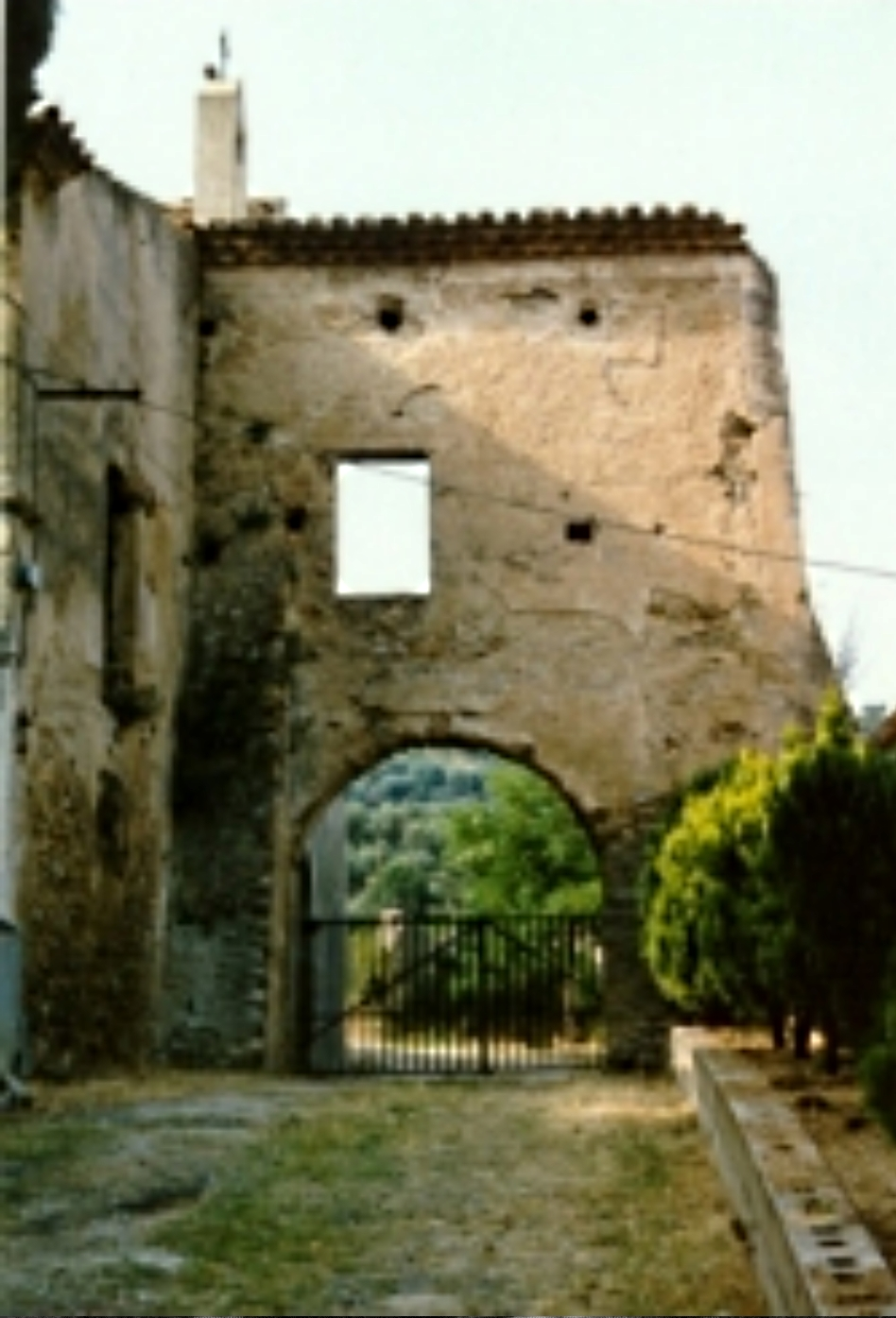 cappucini mesoraca